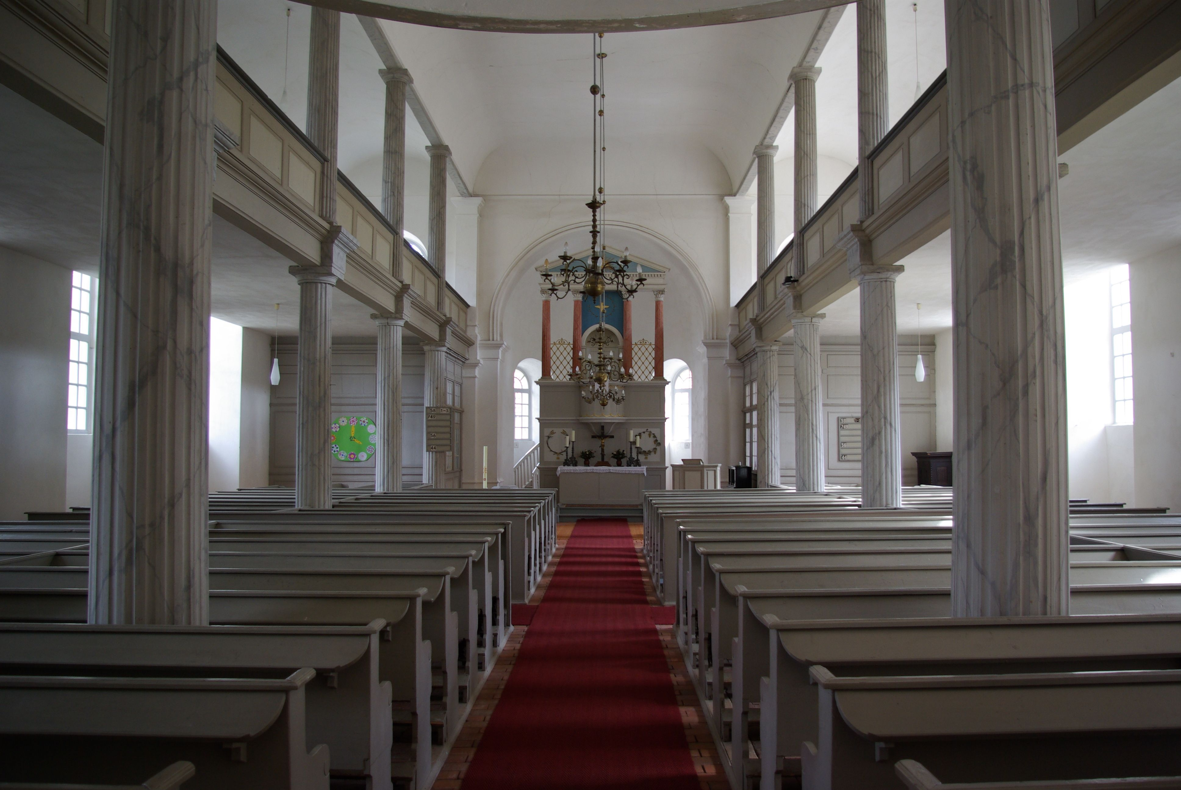 Golßen, Brandenburg. Das Innere der Kirche an der Schulstraße. Die Kirche stammt aus dem 19. Jahrhundert.